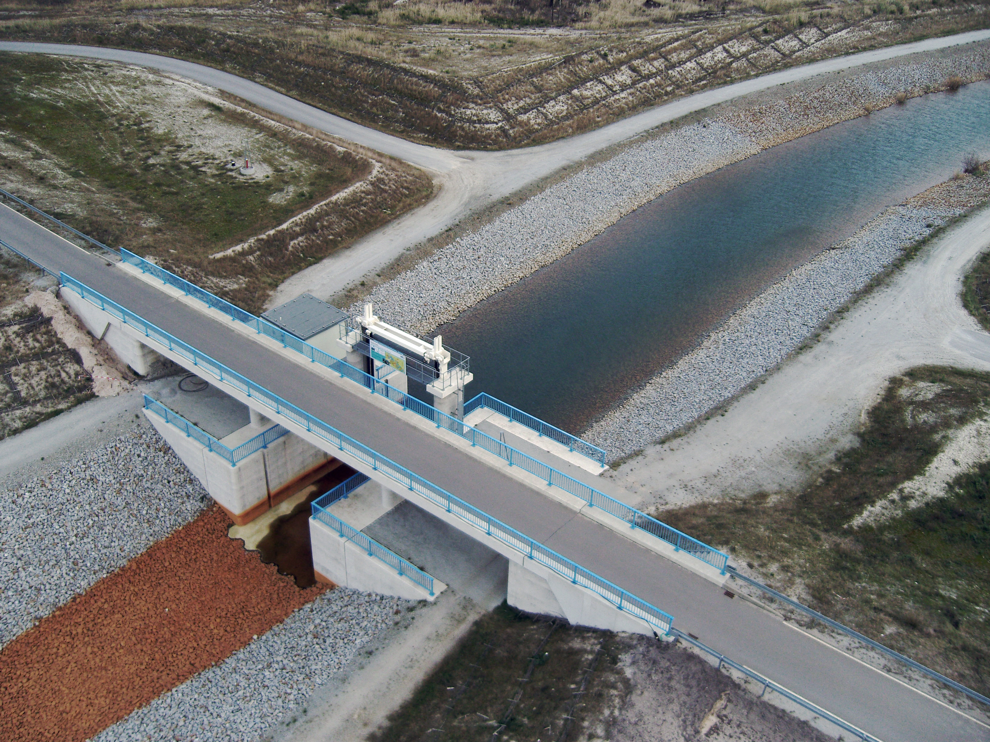 Sornoer Kanal Verbindung zwischen Geierswalder See und Sedlitzer See bei Kleinkoschen